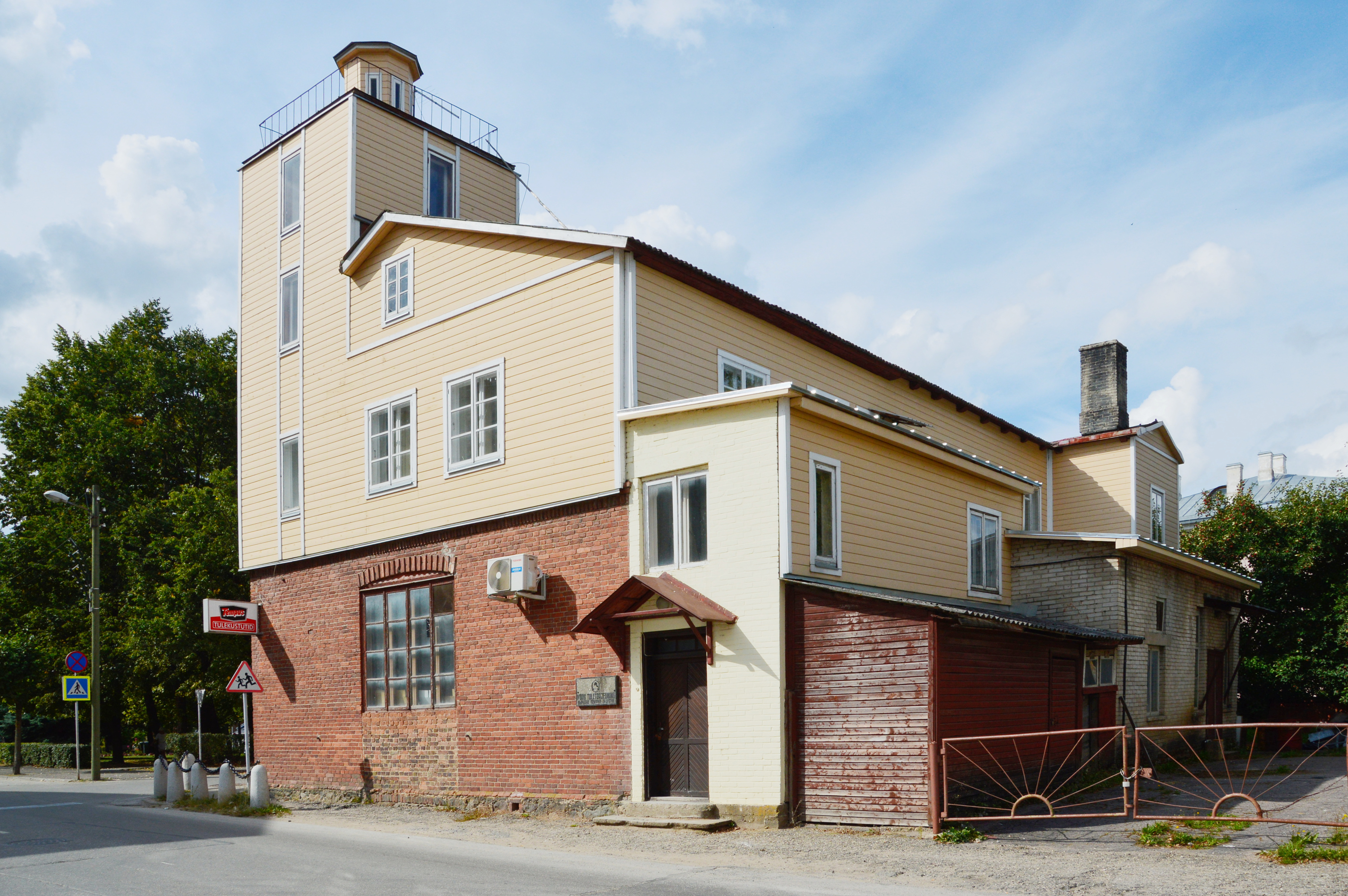 Võru endine pritsumaja